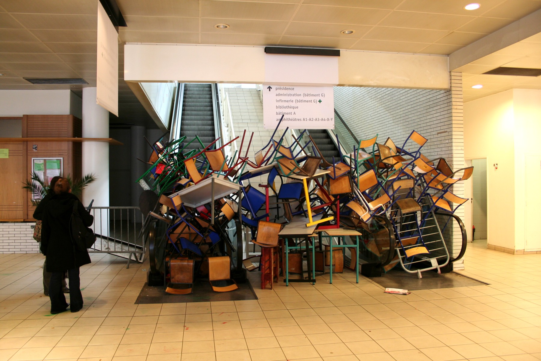 Paris VIII / Saint-Denis University (students strike)